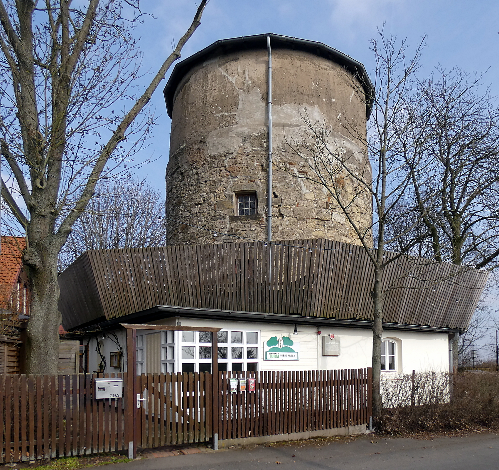 Der ehemalige Wartturm auf dem Lindener Berg in Linden bei Hannover wurde 1650-52 zur Windmühle umgebaut und bis 1927 genutzt. Heute Gaststätte Lindener Turm.